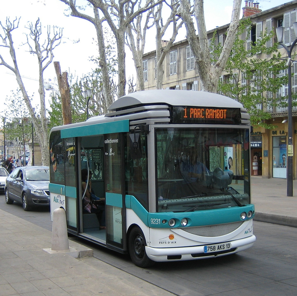 Bus d'Aix-en-Provence